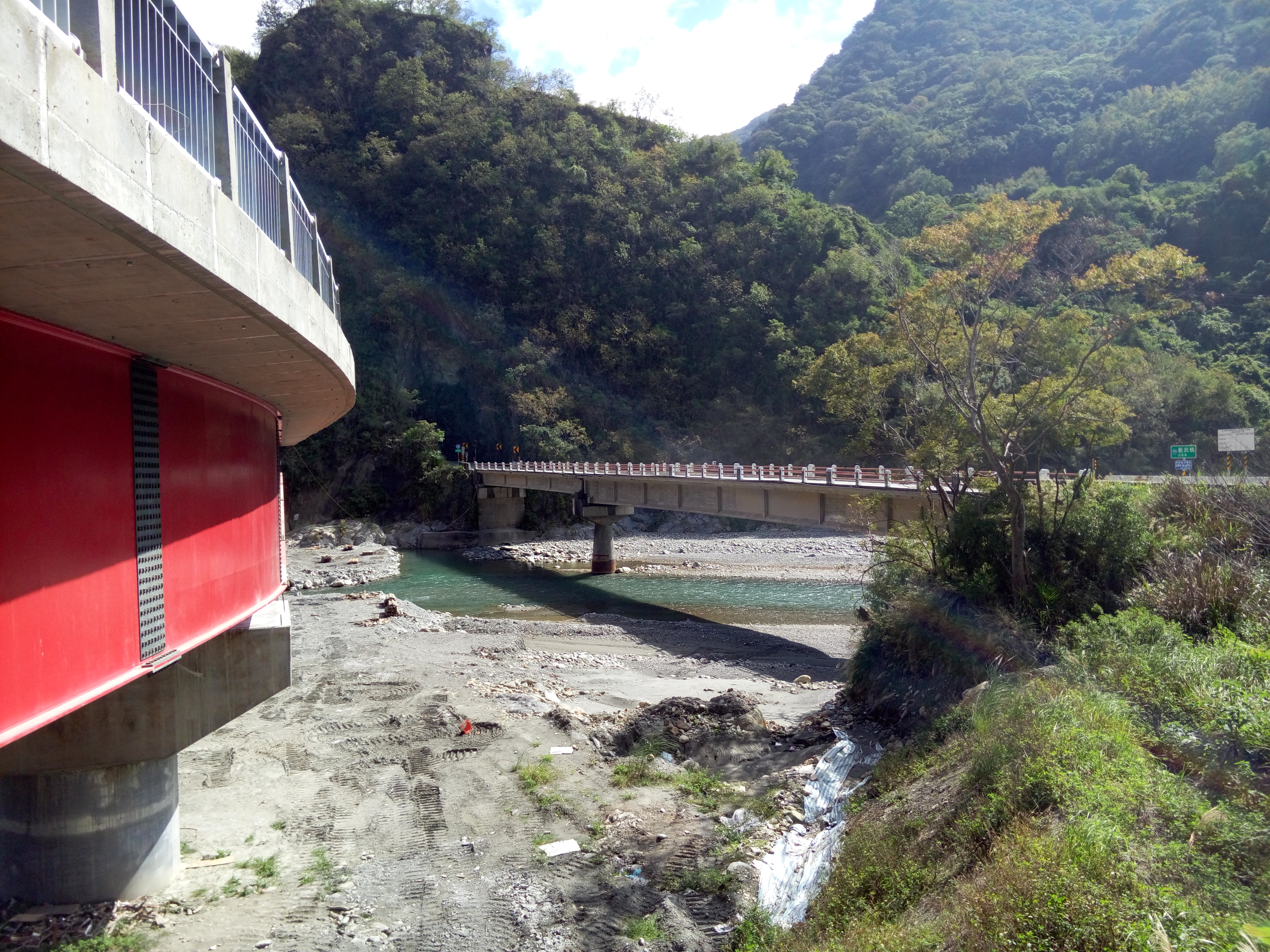 臺灣臺東縣海端鄉南橫公路新武橋